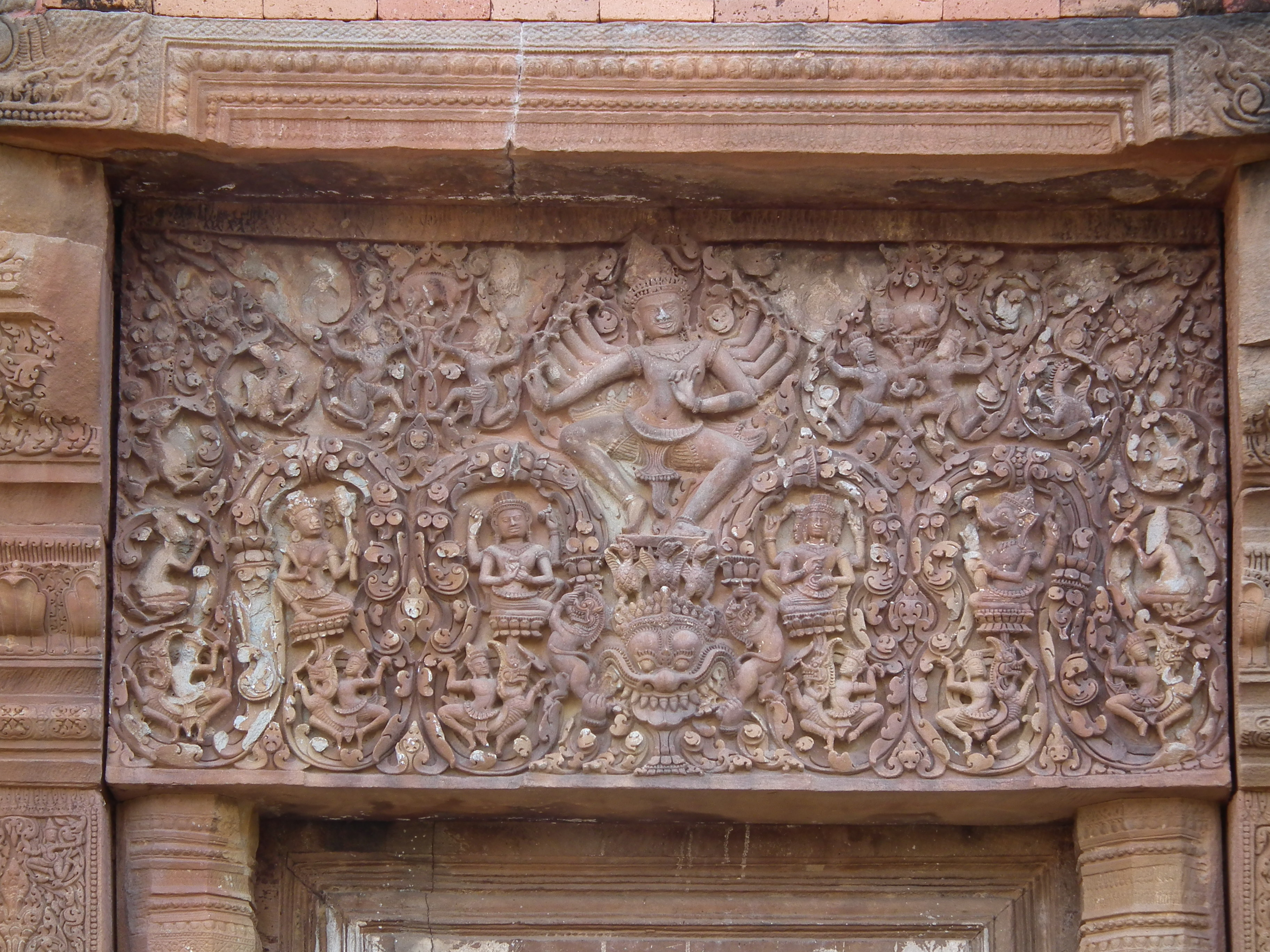 ทับหลังปราสาทประธานของปราสาทศีขรภูมิ